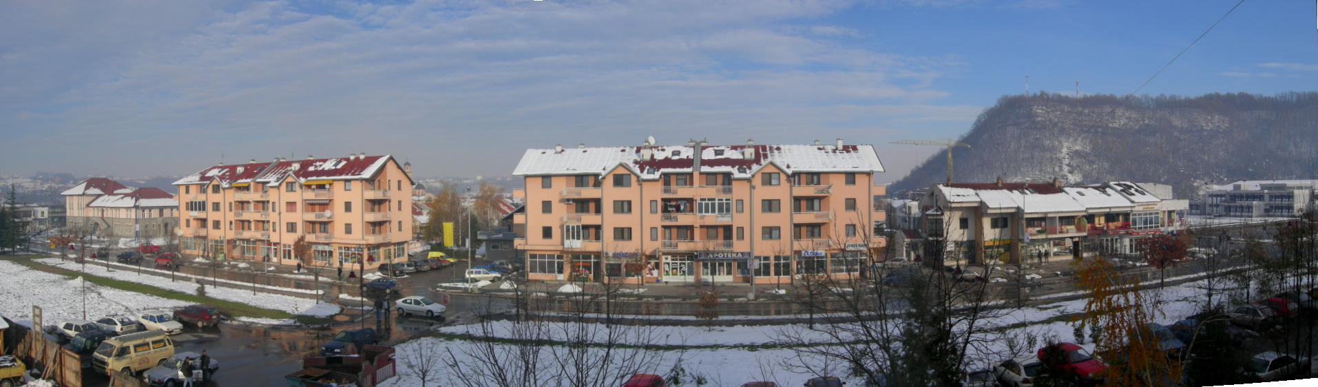 Main Street in Ugljevik - Karadjordjeva street.